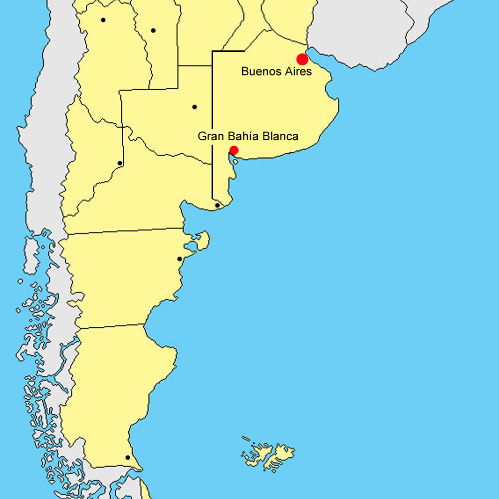 Lage von Gran Bahía Blanca /Argentina